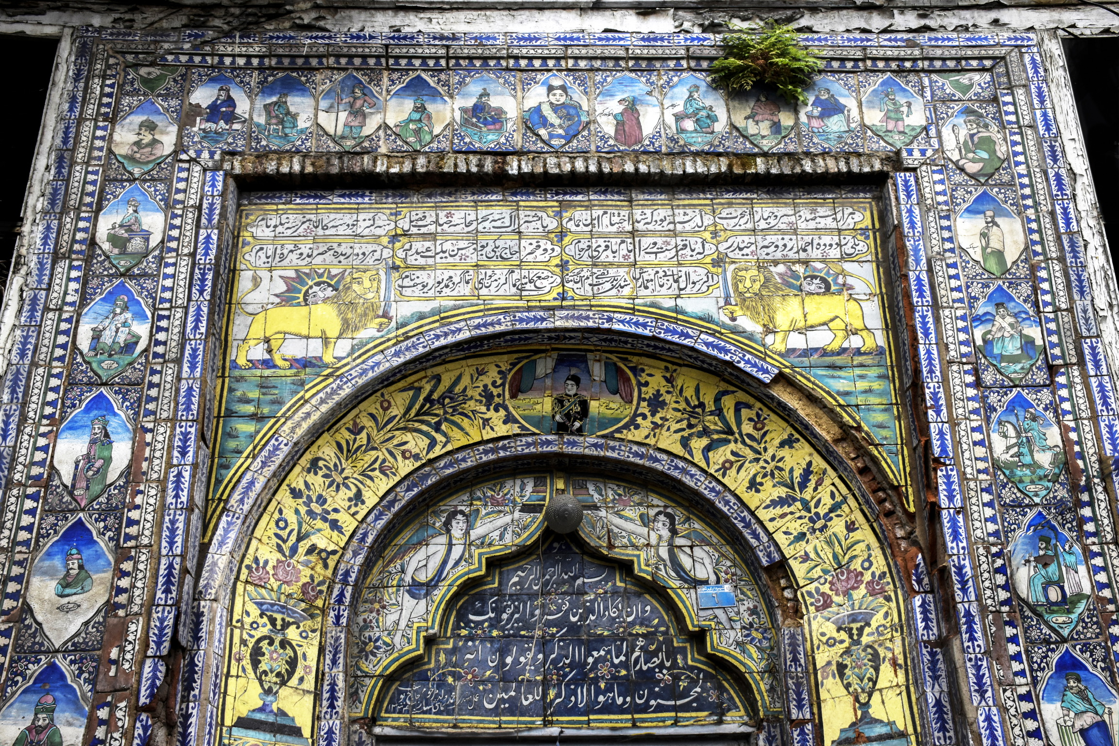 سردرحمام گلزار